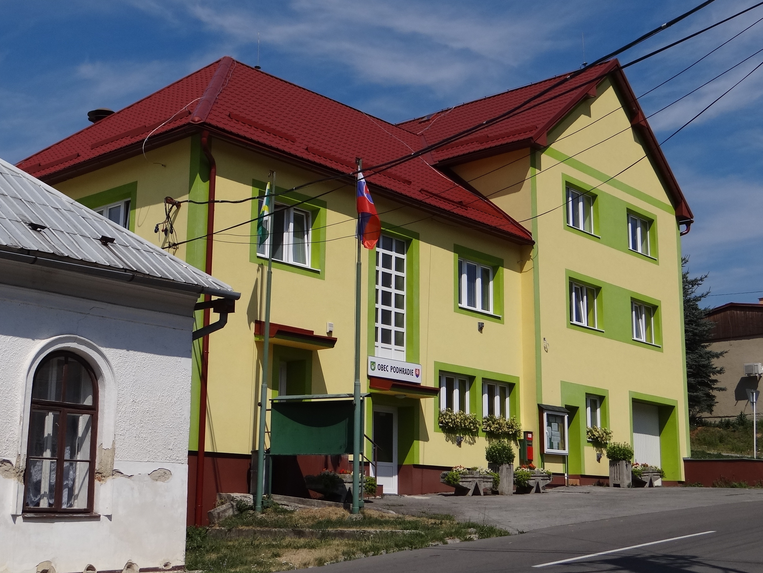 Podhradie. Urząd gminy